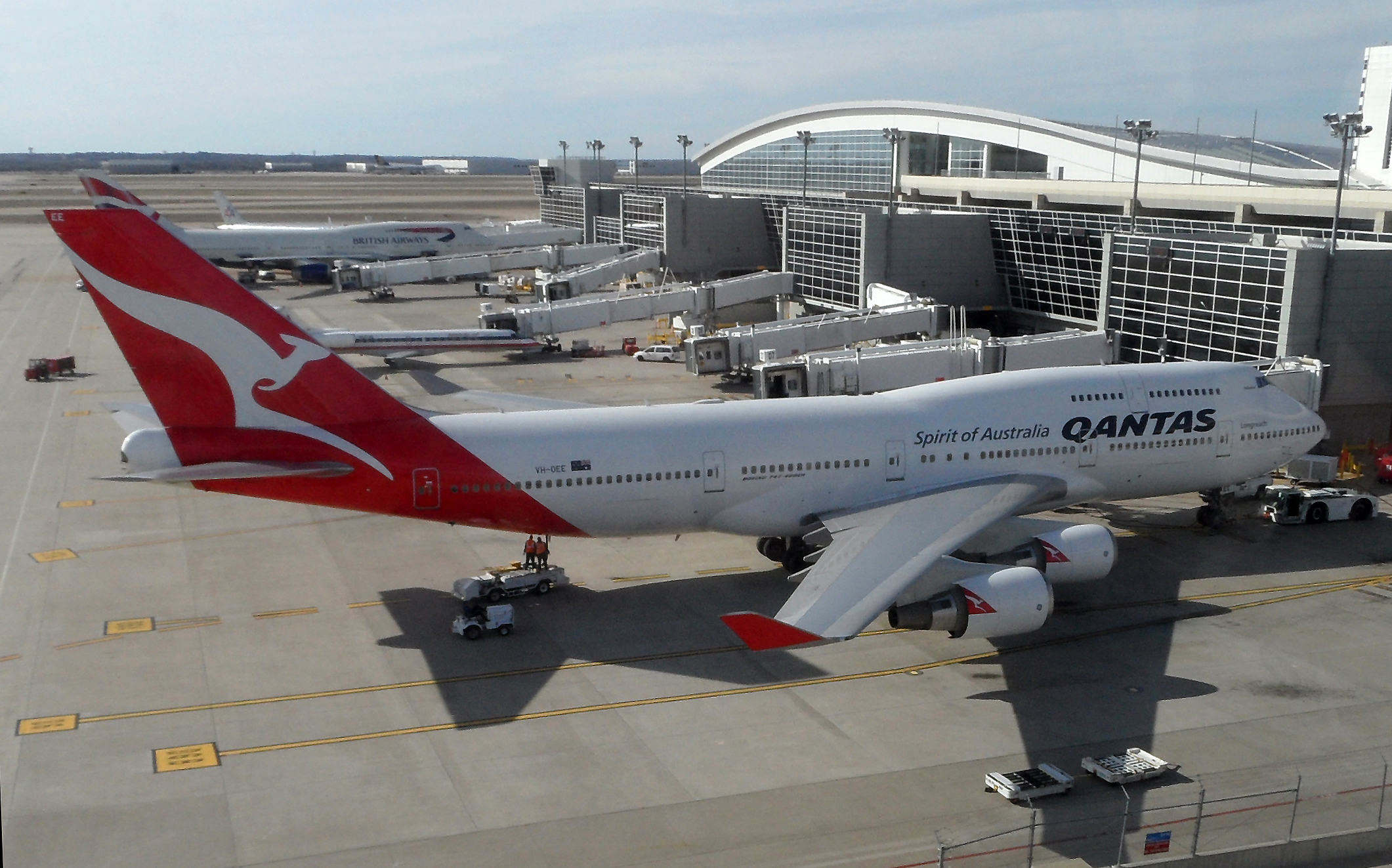 MSN 32909 B747-438 ER QANTAS DFW